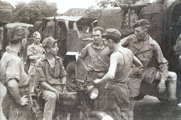 negatief. Militaire kolonne tijdens de eerste politionele actie